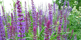 svsdvsvsvsvssvsvs